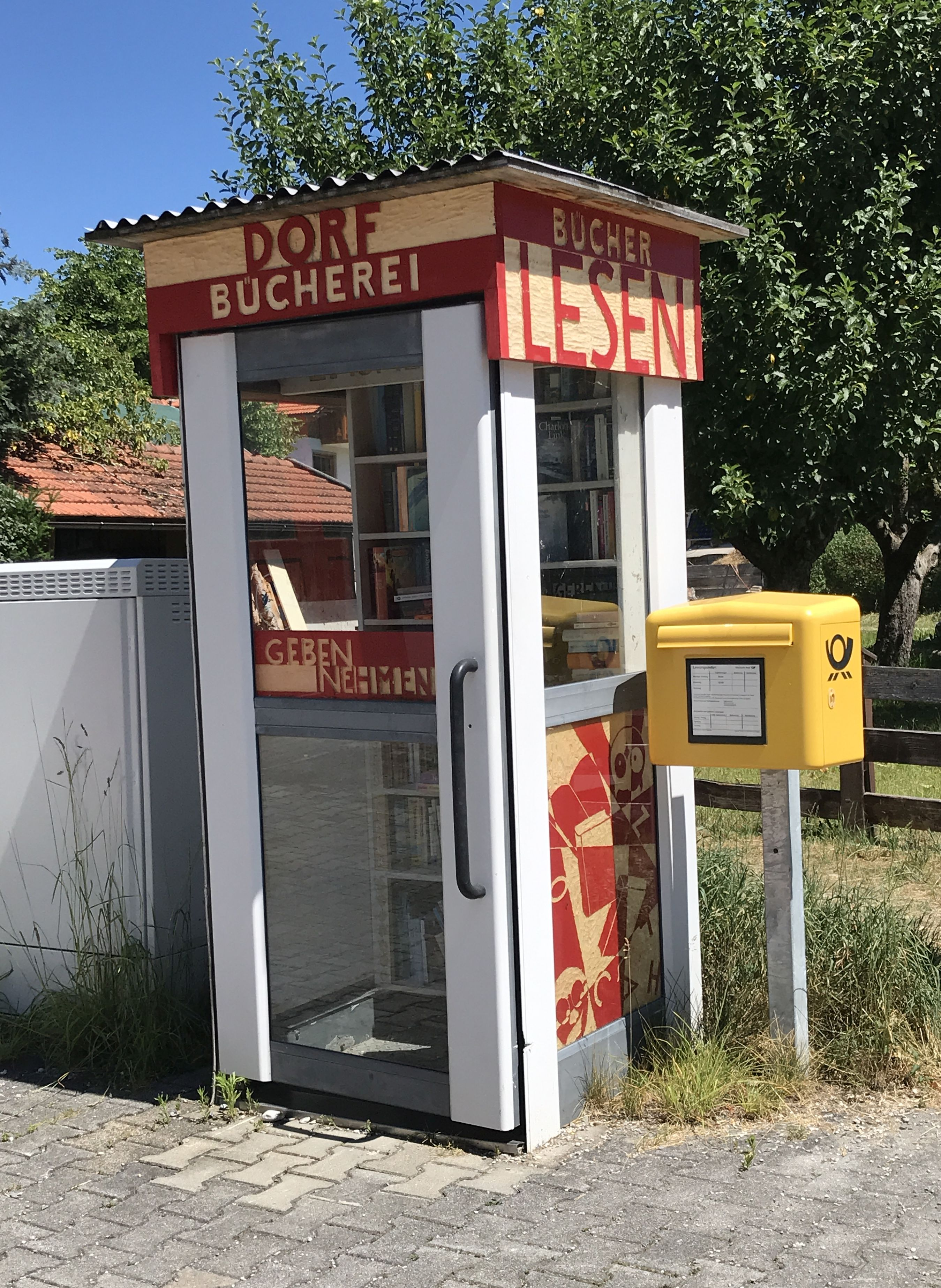 Öffentlicher Bücherschrank in Riegsee, Landkreis Garmisch-Partenkirchen, initiiert von Jörg Steinleitner und Johannes Volkmann. Der Bücherschrank befindet sich in einer umgebauten Telefonzelle und wurde im August 2016 von Kindern in einem Sommerferien-Freizeitprojekt eingerichtet.